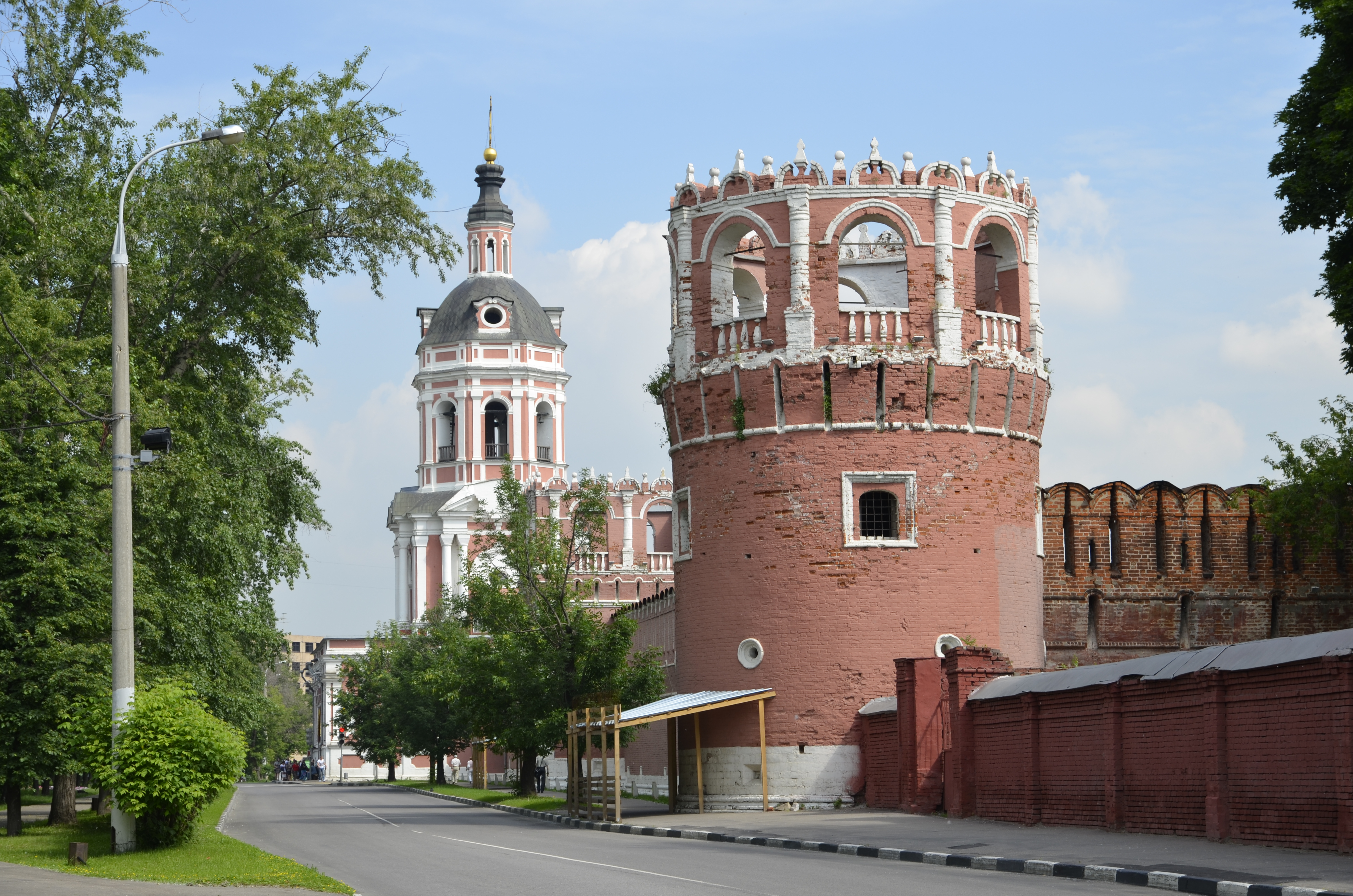 Монастырь Донской (Москва и Московская область, Москва, Донская площадь, 1)